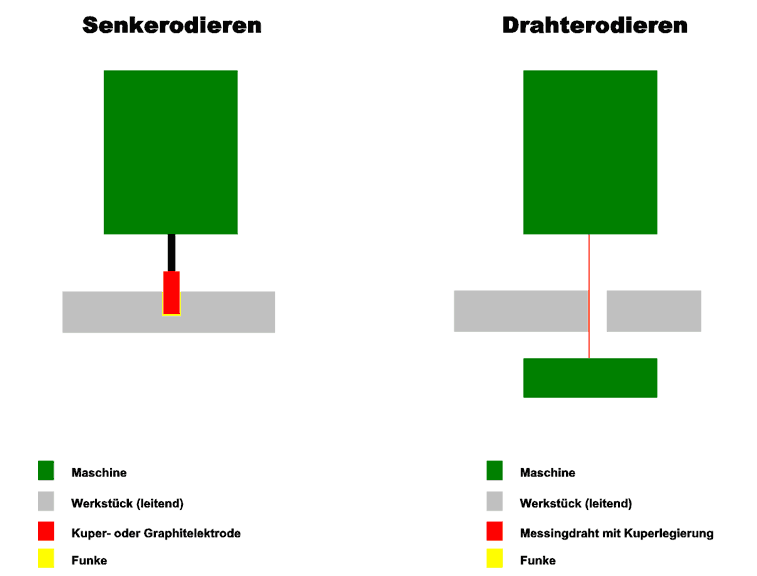 Erodieren (Drahterodieren, Senkerodieren)